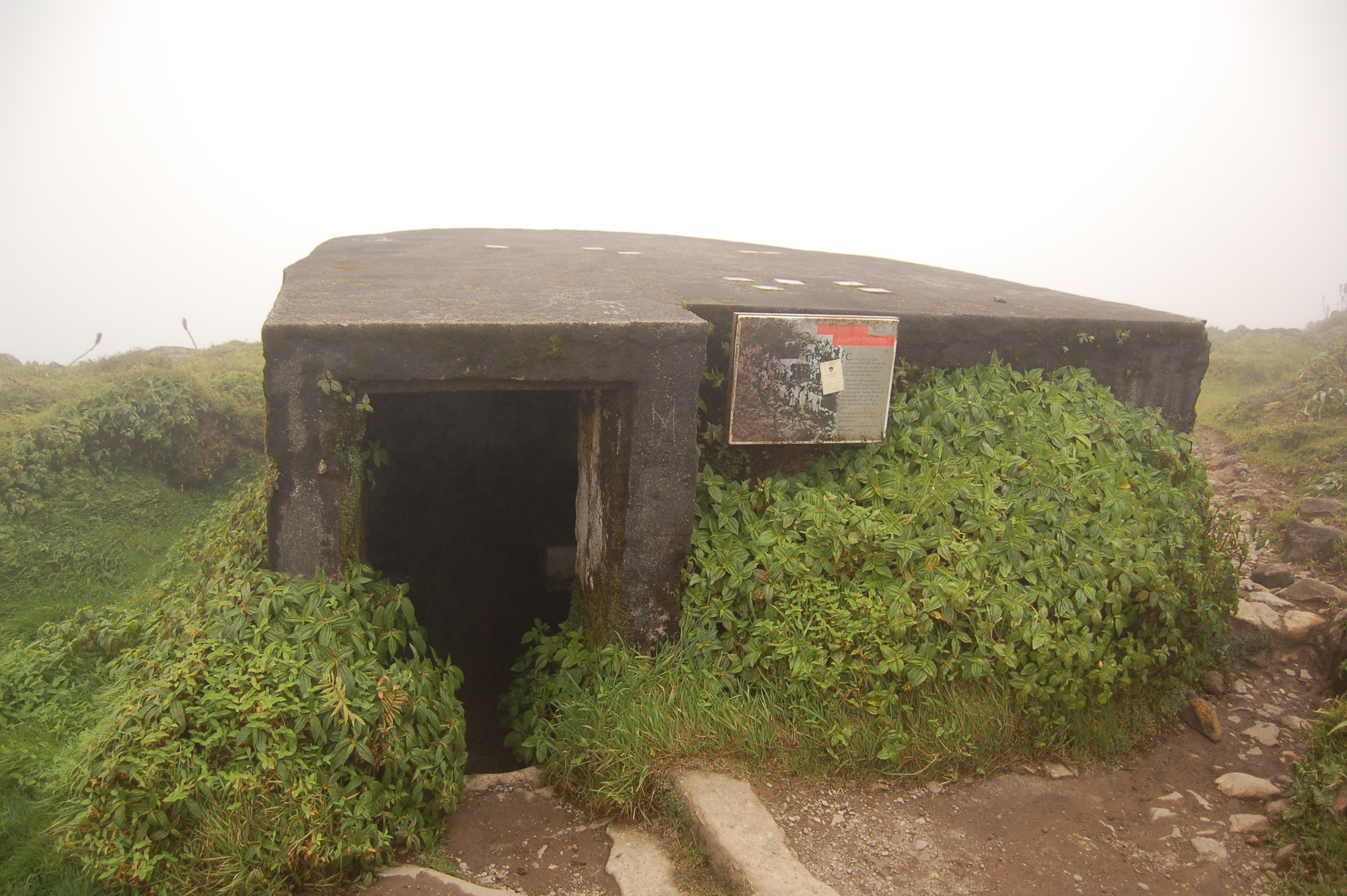 Refuge au sommet de la Soufrière en Guadeloupe